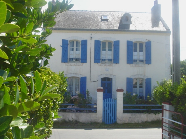 Villa Beauséjour, une maison de villégiature du XIXe siècle à Roserières à Palais (56)